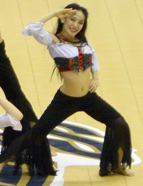 megu ハロウィン